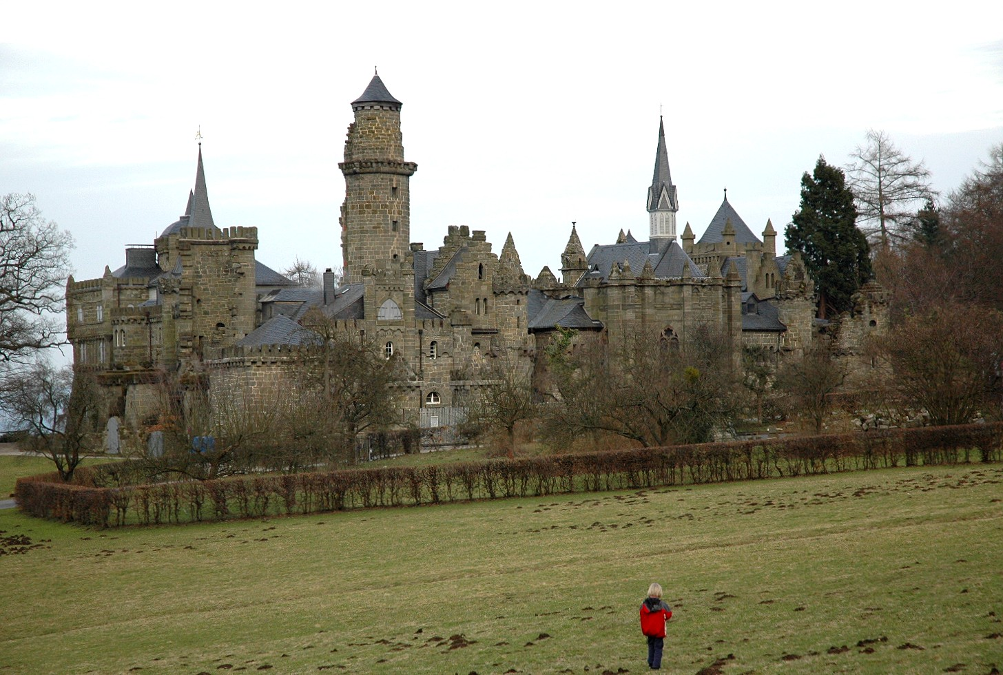 Bergpark wilhelmshoehe loewenburg von westen, 2005 Photograph: Benutzer:Hafenbar